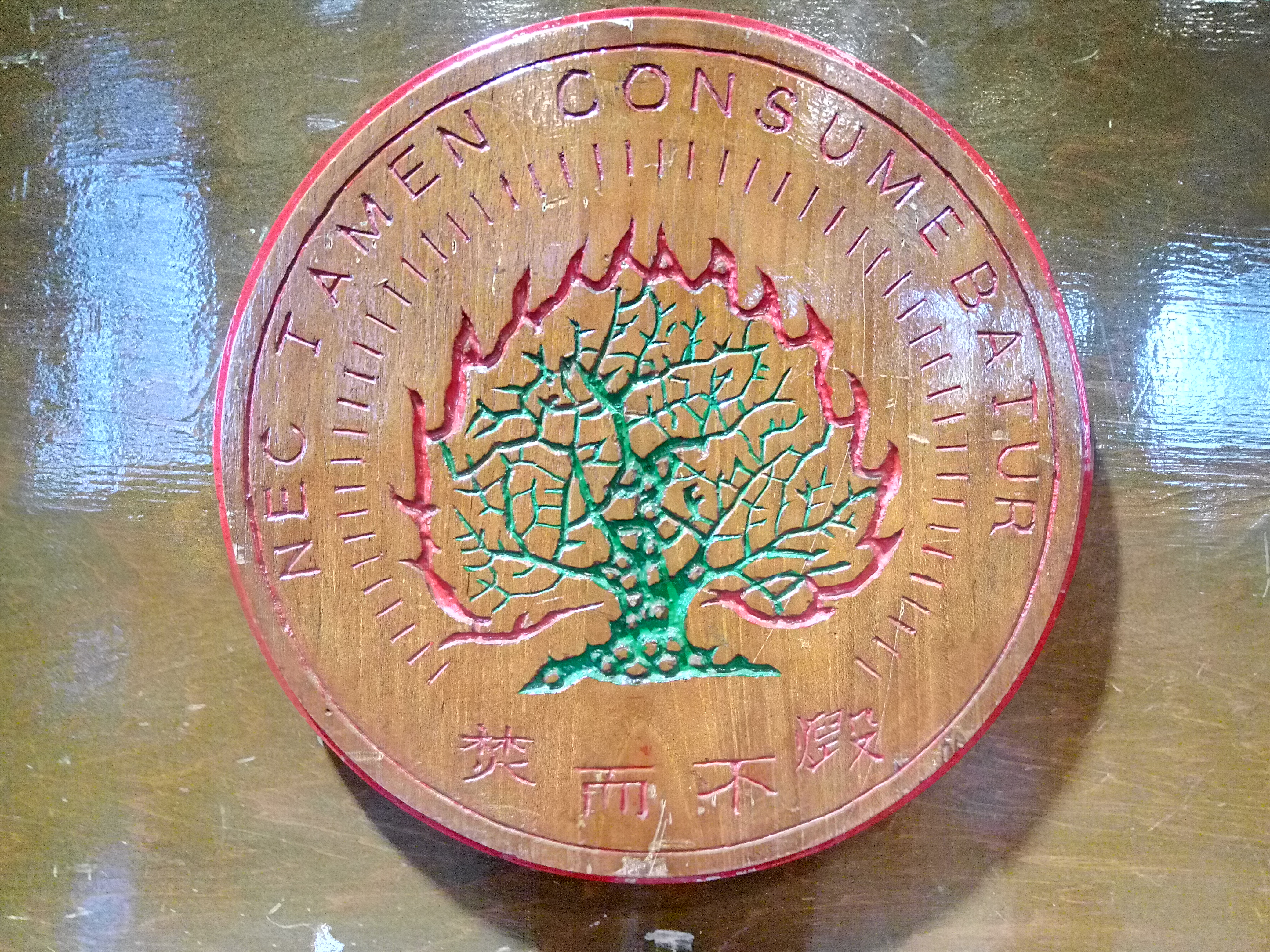 台湾基督長老教会のロゴ